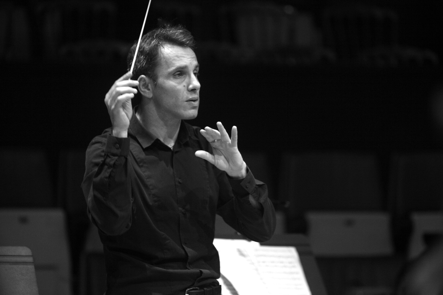 Portrait de Fayçal Karoui dirigeant l'Orchestre Lamoureux (credit Rouge 202)